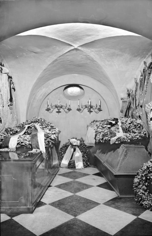 Potsdam.- Königsgruft in der Garnisonkirche